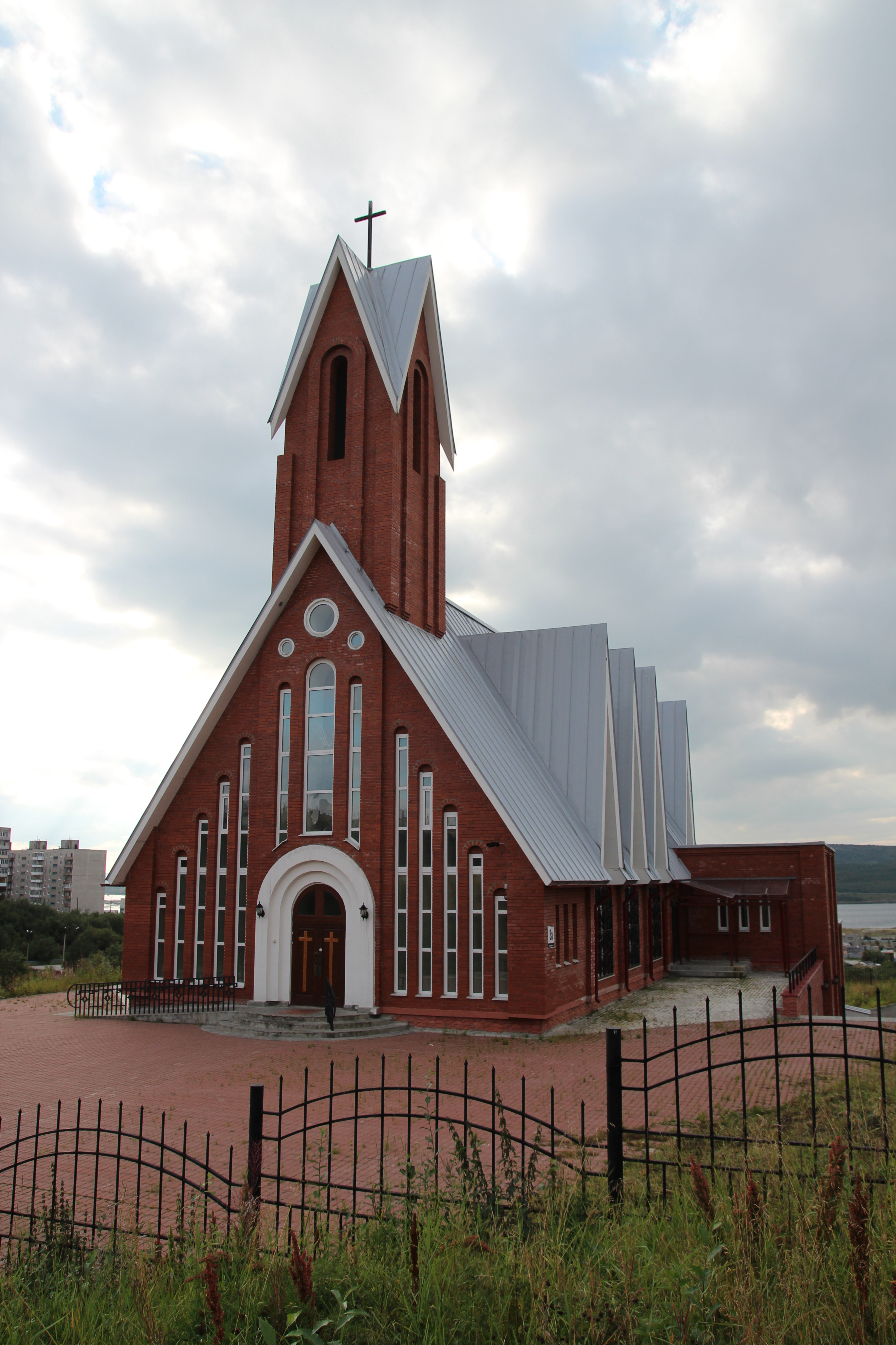 Храм Михаила Архангела в Мурманске.jpg